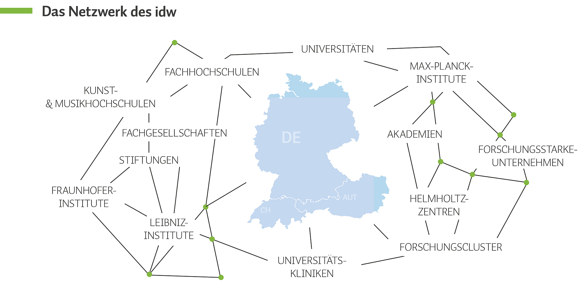 Der idw bündelt die Informationen aus rund tausend Wissenschaftseinrichtungen. Die Grafik zeigt die hauptsächlichen Einrichtungs-Arten und -Standorte.